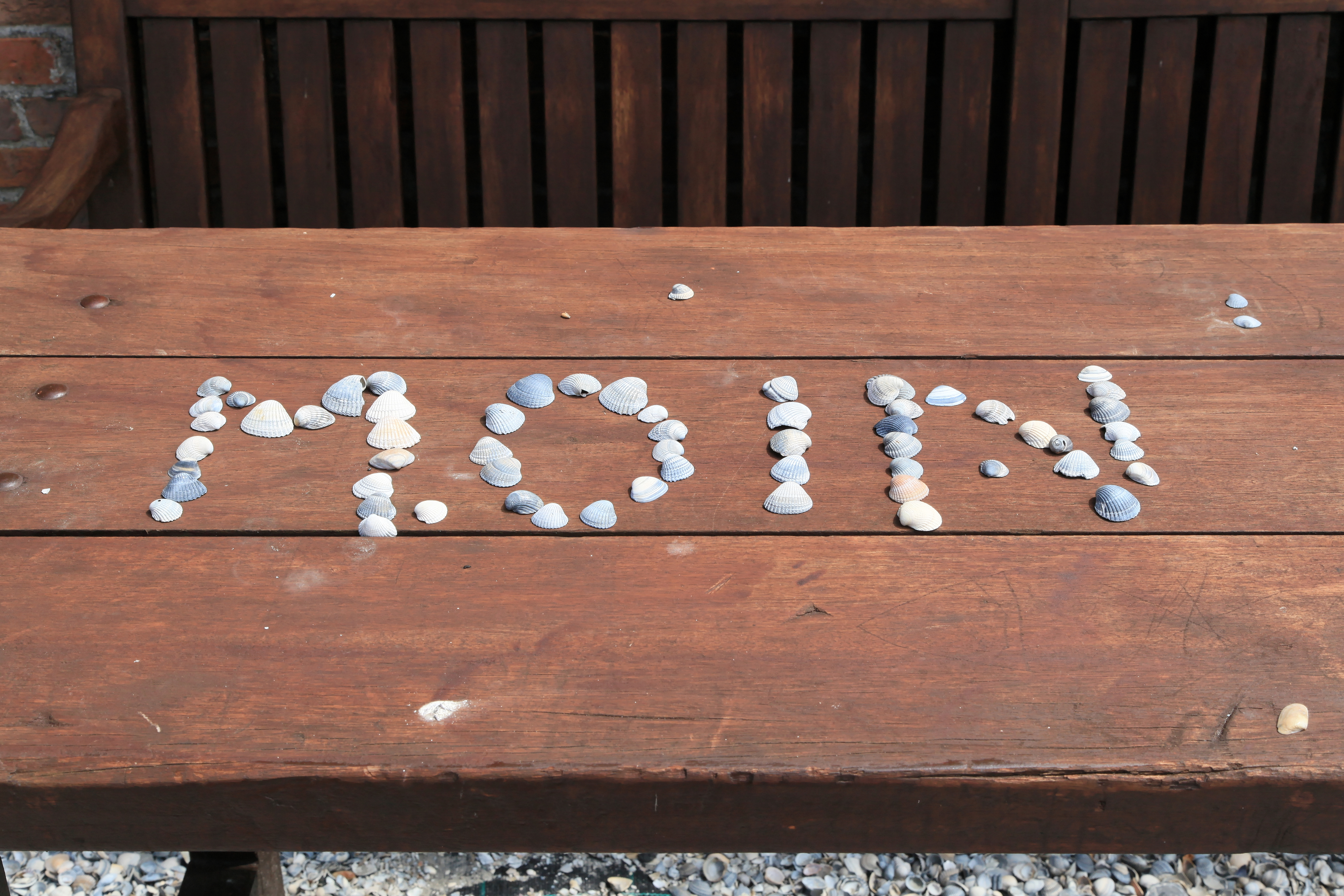 Ditzumer Hofstraße in Ditzum, Jemgum